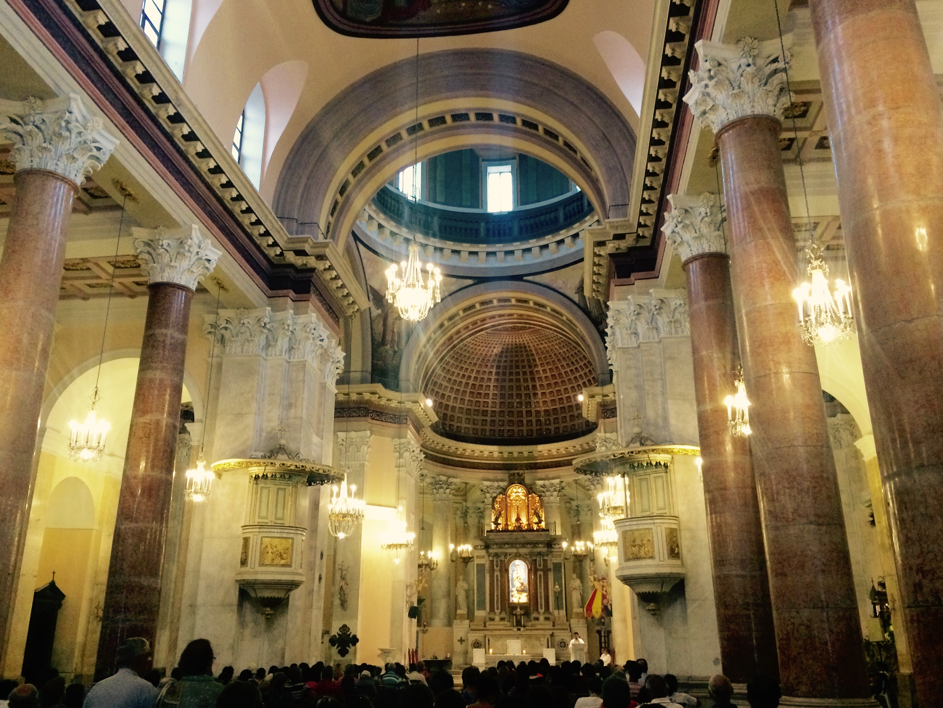 Interior da Basílica da Penha - Recife, Pernambuco, Brasil